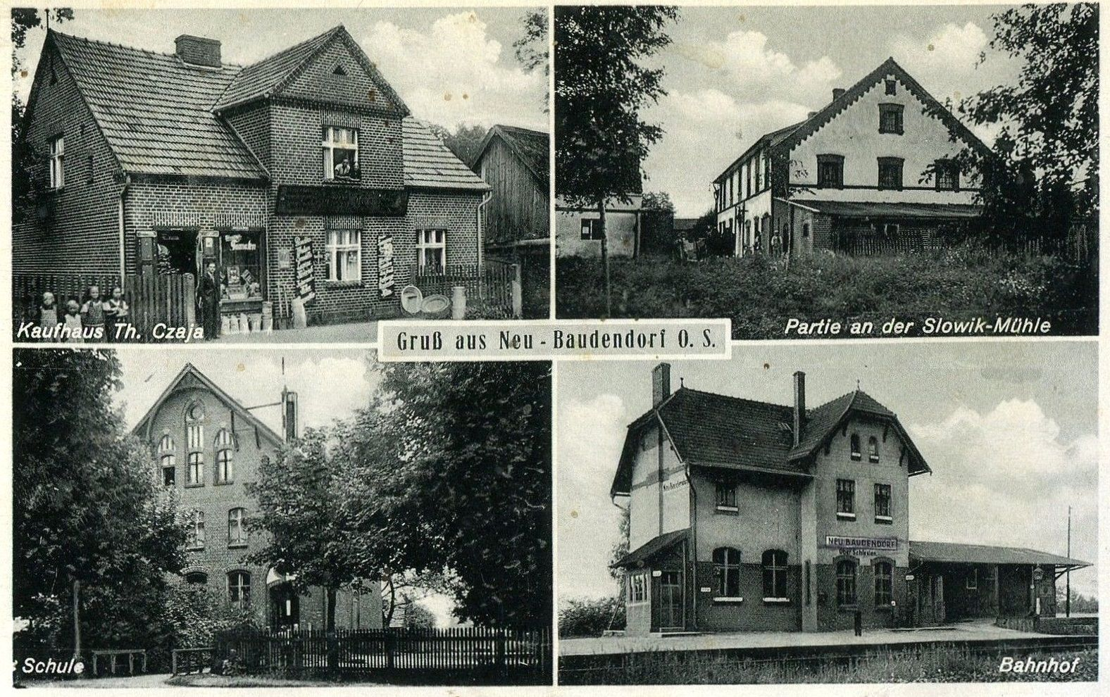 Alte Postkarte von Neu Budkowitz (Oberschlesien), poln. Nowa Budkowice, 1936-1945 Neu Baudendorf